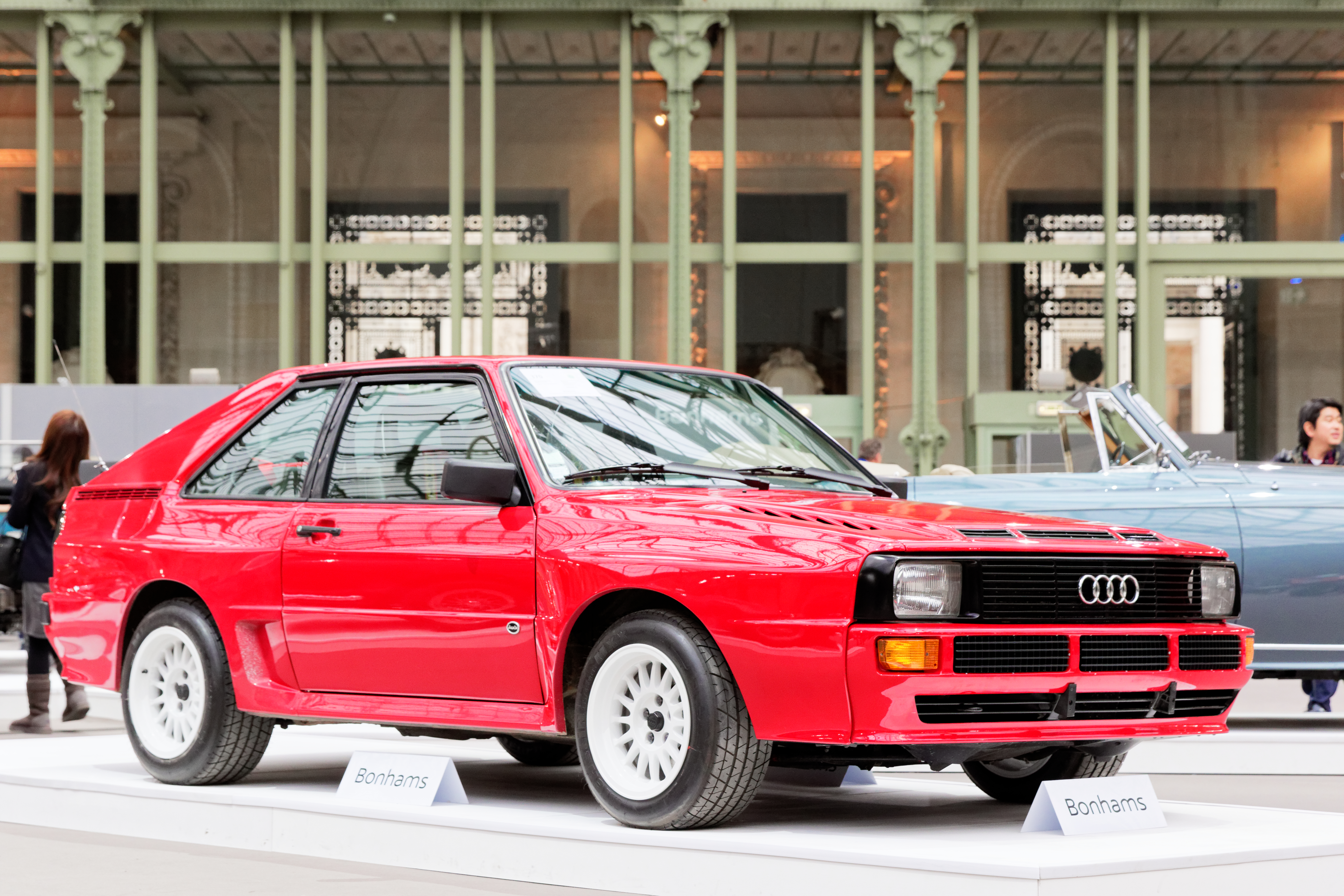 Un des véhicules présenté lors de la vente aux enchères Bonhams 2017 au Grand Palais de Paris.